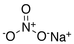 2d molecular structure of Sodium Nitrate